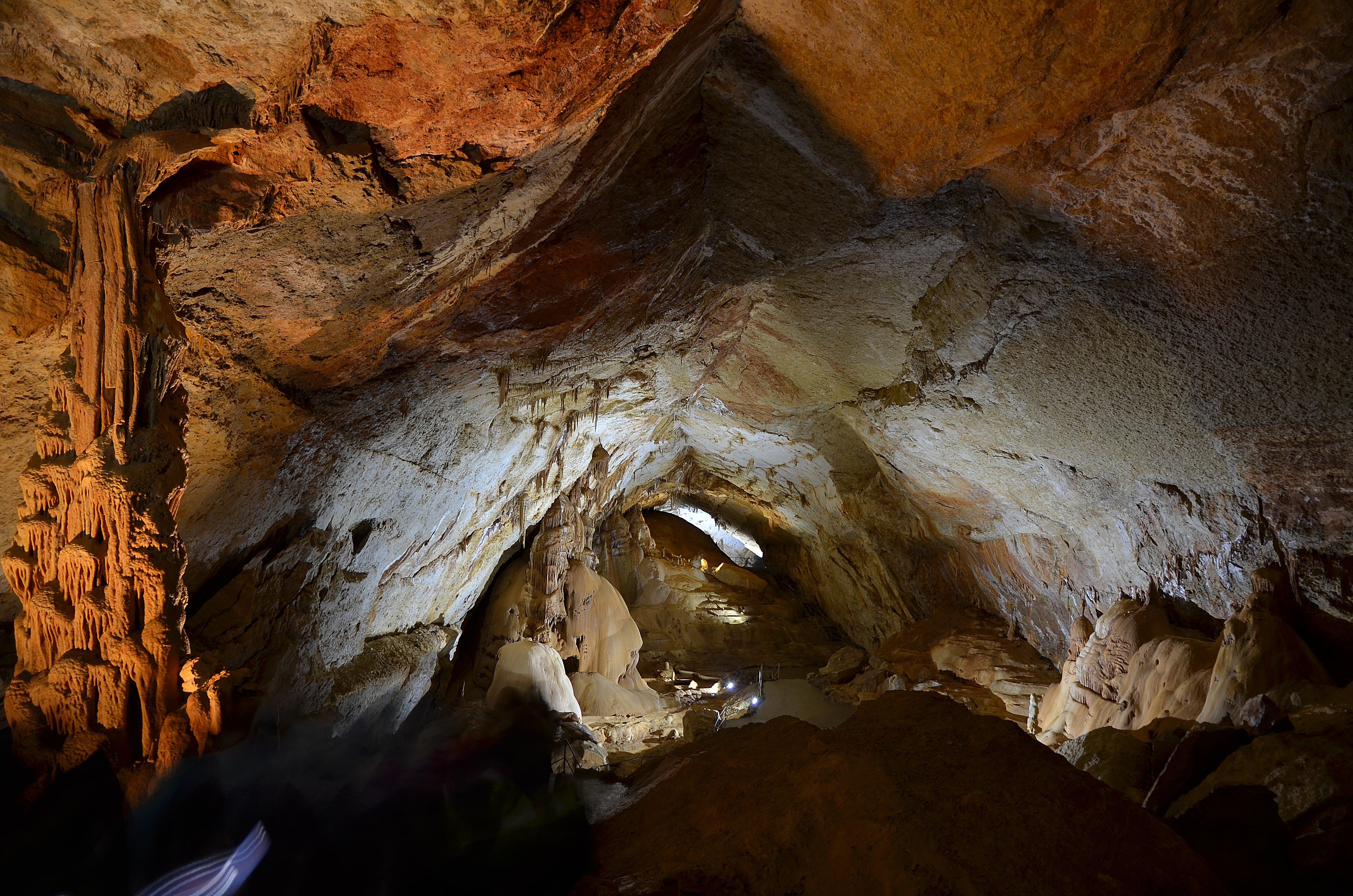 Подробнее здесь